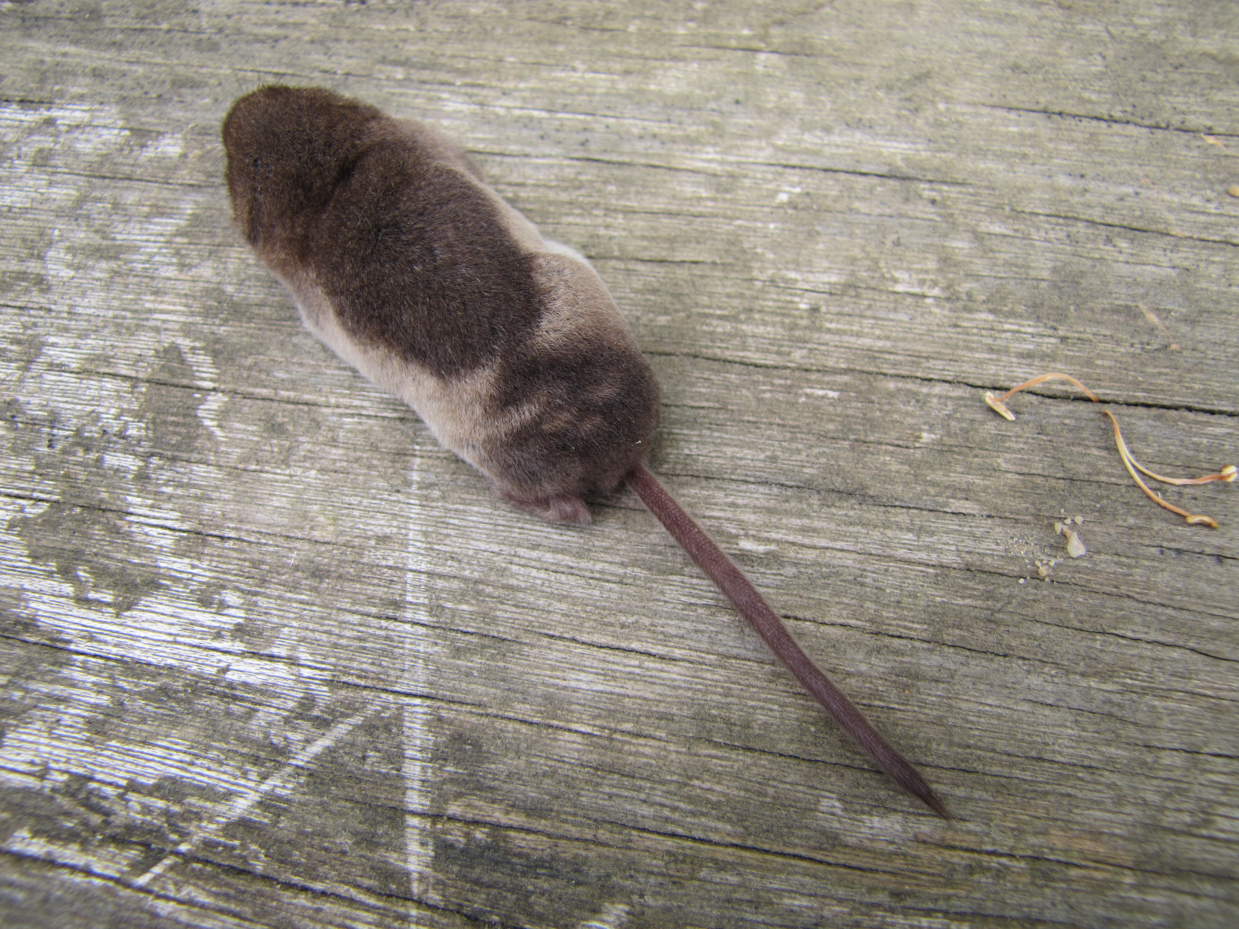 Musaraigne à tâches